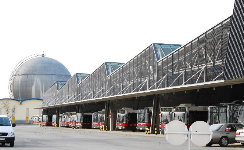 Betriebsgarage Leopoldau der Wiener Linien in Floridsdorf, im Hintergrund ein Kugelgasbehälter auf dem Areal des ehemaligen Gaswerks Leopoldau